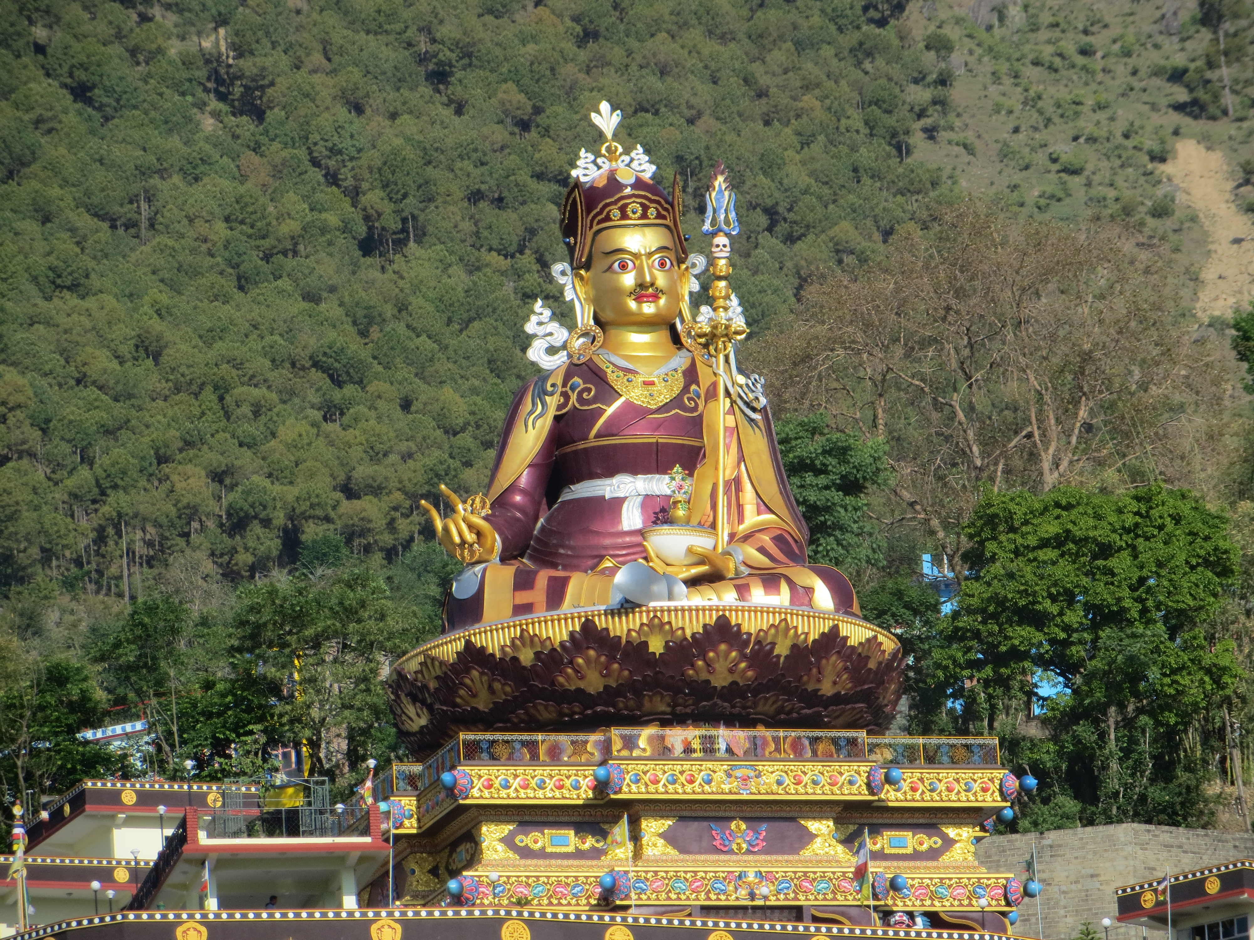 Статуя Падмасамбхава в Ревалсар, Индия